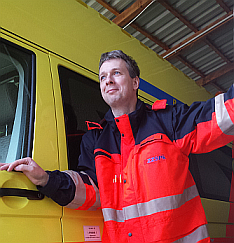 MUDr. Zdeněk Hess, Ph.D., lékař, vědec, publicista